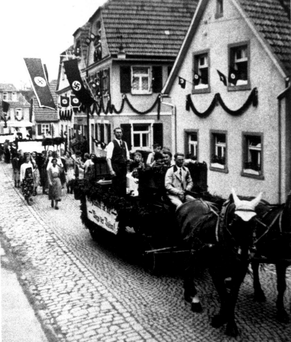 Von den Nazis zum Maifeiertag organisierter Aufmarsch durch die mit Hakenkreuzflaggen geschmückte Burgkunstadter Oberstadt am 1. Mai 1938. An den Aufmärschen mussten sich alle Firmen, größere Unternehmen, Vereine und Zünfte im Rahmen der "deutschen Arbeitsfront" beteiligen.